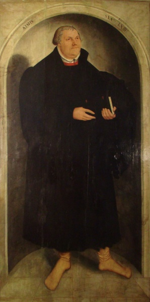 Lucas Cranach d. J.: Martin Luther, seines Alters 63, dat. 1546, Schwerin, Staatliches Museum (Außenstelle Schloss Güstrow), Inv. Nr. G 864